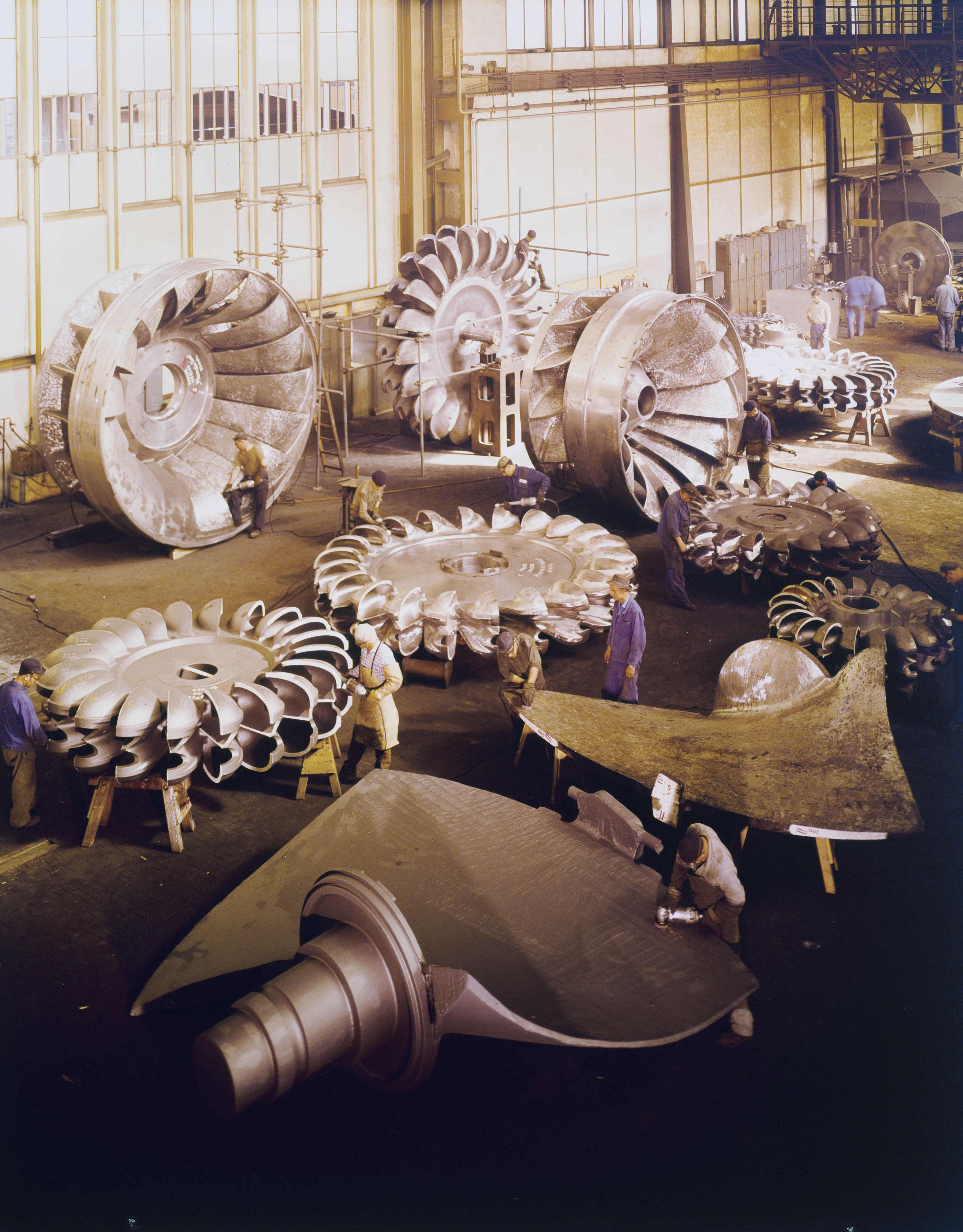 Peltonrad, Francisrad, Kaplanschaufel